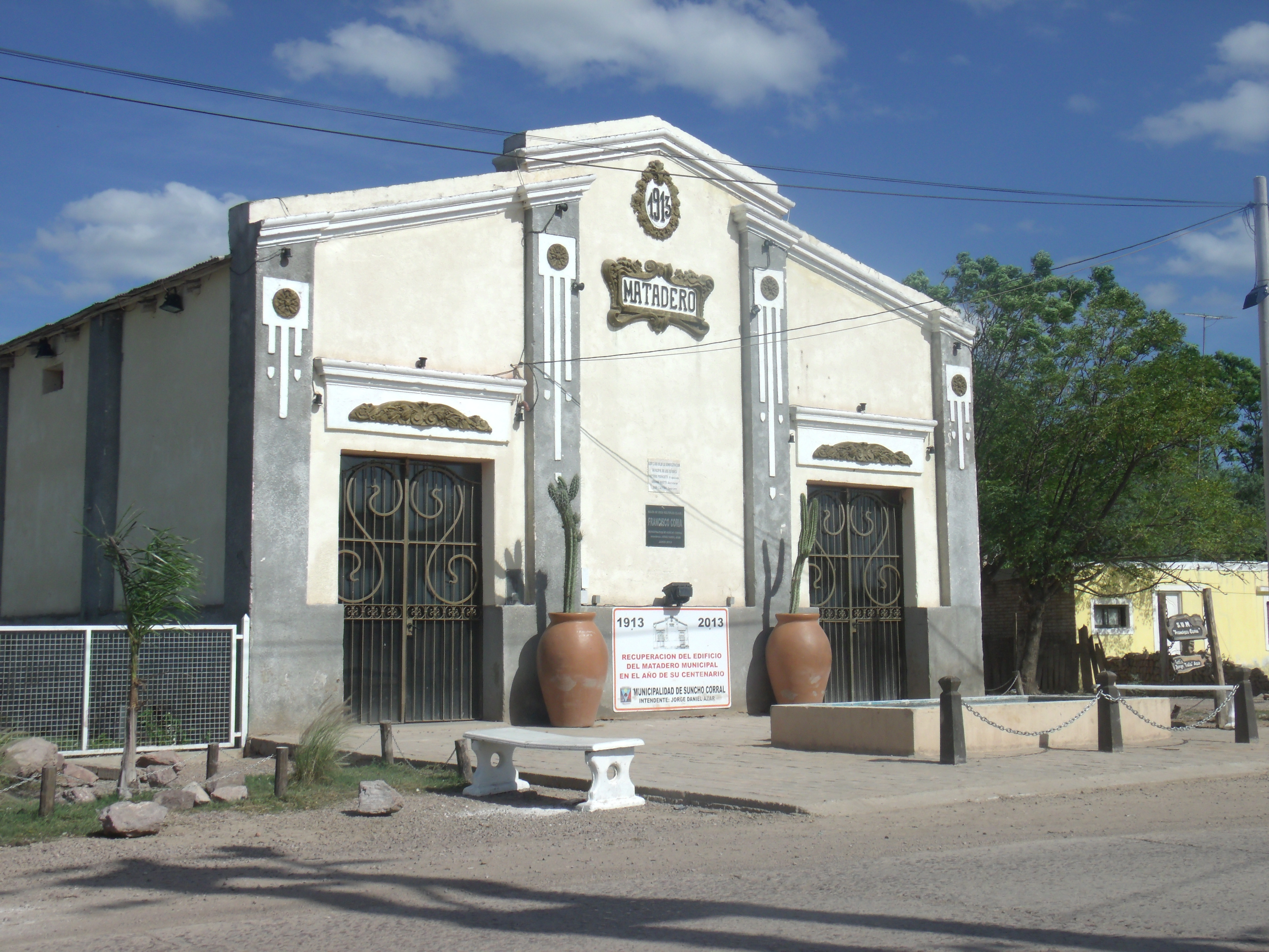 Edificio restaurado del antiguo matadero municipal de Suncho Corral, sobre la Ruta Nacional 89